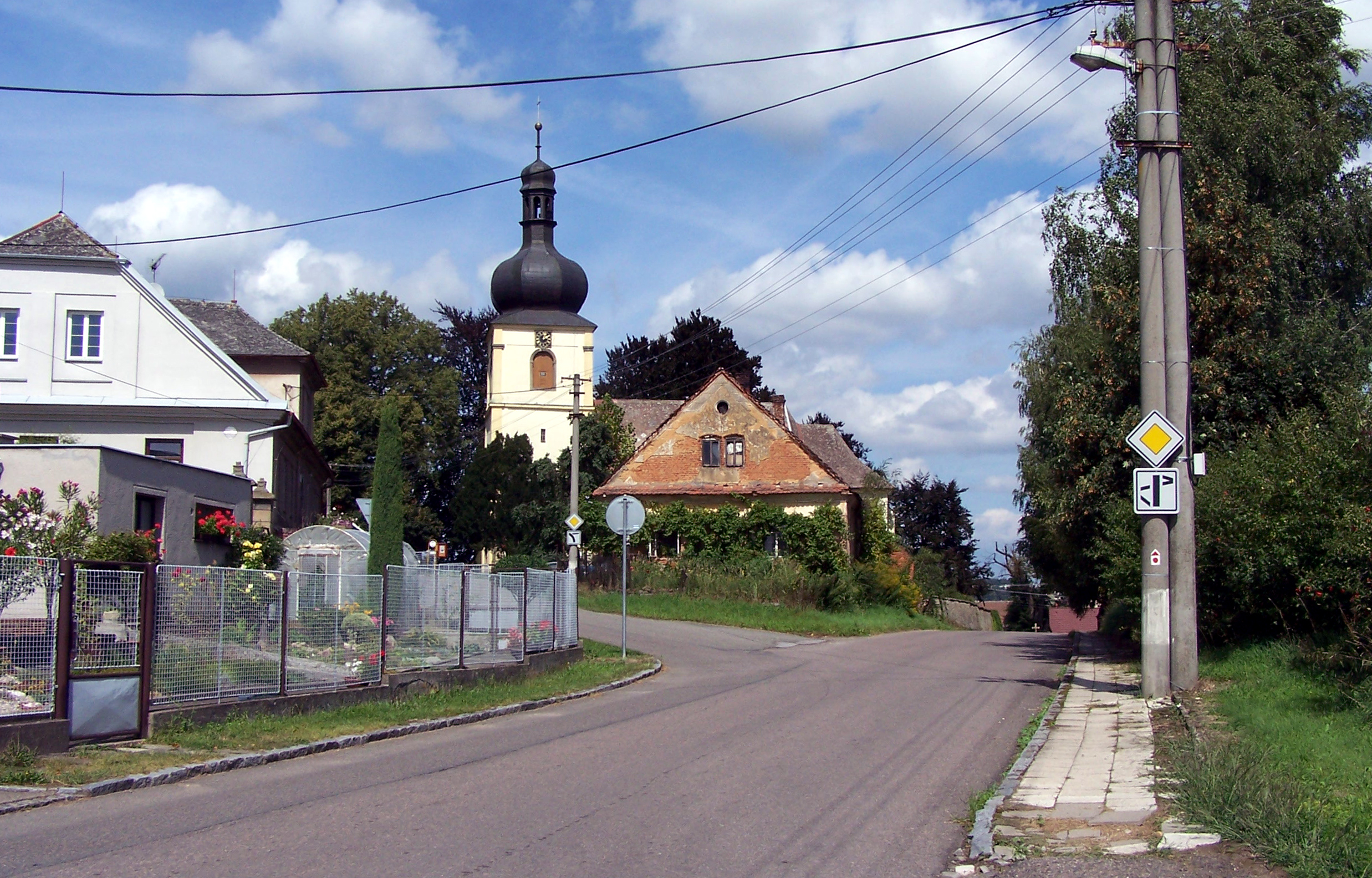 Hněvčeves – kostel svatého Jiří.